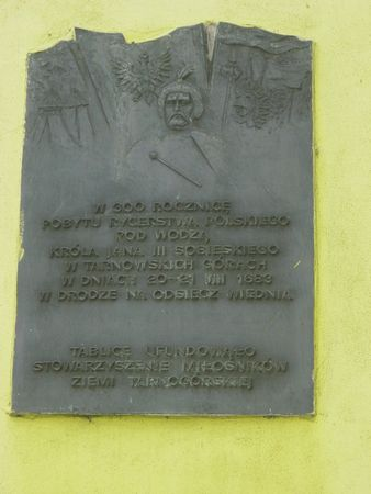 Tablica pamiątkowa w Tarnowskich Górach